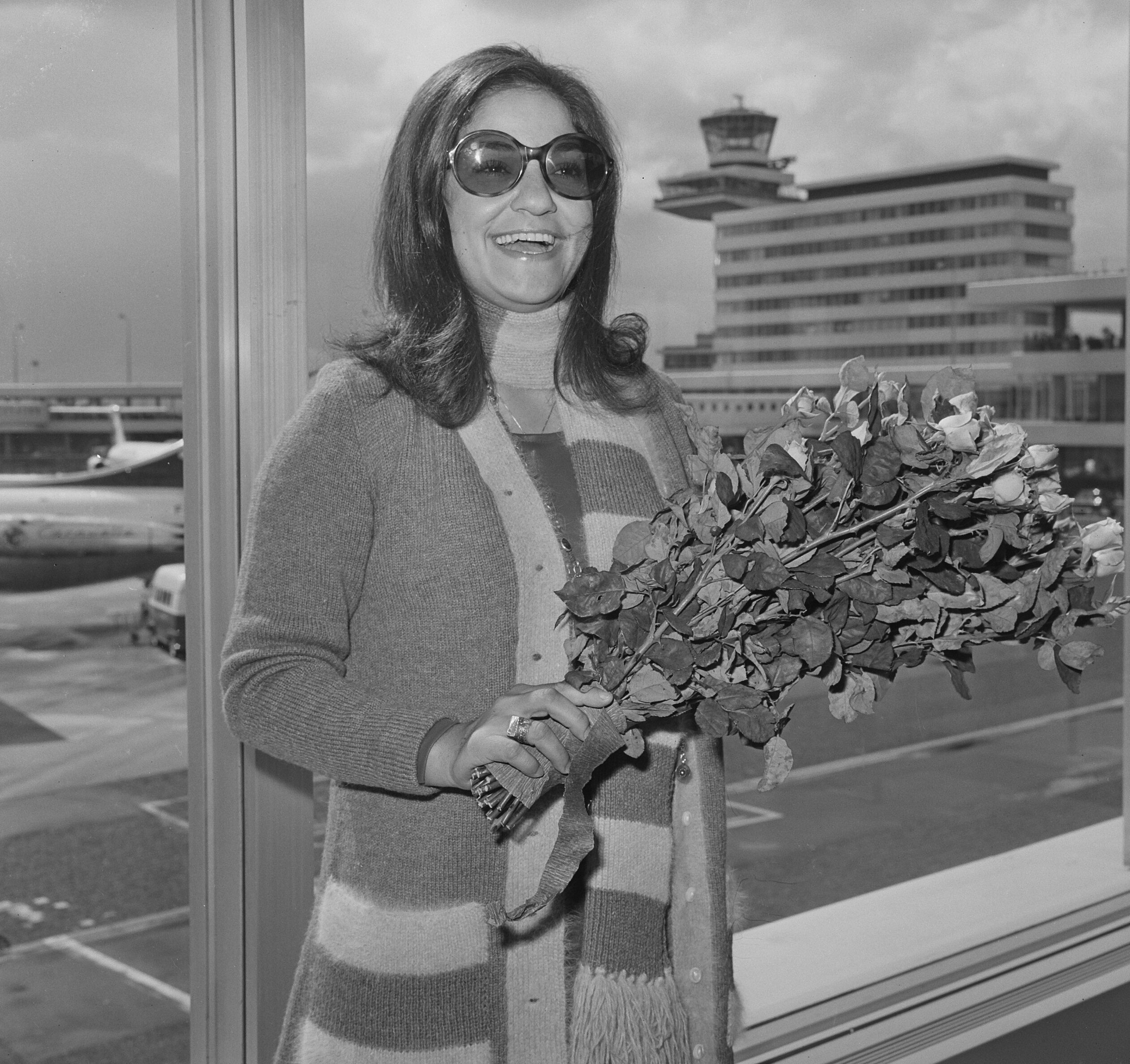 Collectie / Archief : Fotocollectie Anefo Reportage / Serie : [ onbekend ] Beschrijving : Franse zangeres, Frida Boccara , een van de winnaressen van het Eurovisie Songfestival, arriveert op Schilhol, Frida Boccara Datum : 28 augustus 1969 Trefwoorden : zangeressen Persoonsnaam : Frida Boccara Fotograaf : Evers, Joost / Anefo Auteursrechthebbende : Nationaal Archief Materiaalsoort : Negatief (zwart/wit) Nummer archiefinventaris : bekijk toegang 2.24.01.03 Bestanddeelnummer : 922-7401